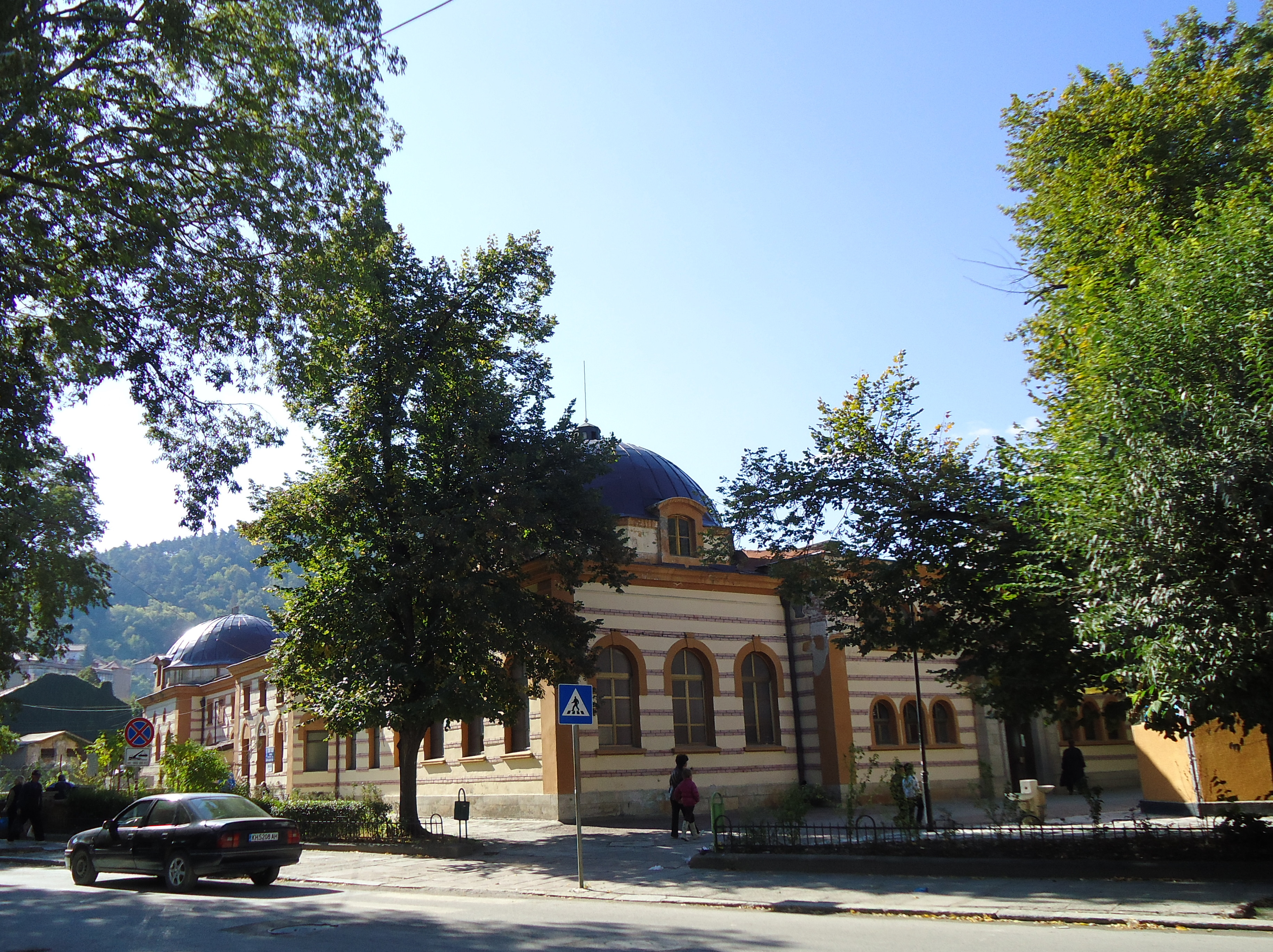 Чифте баня - Кюстендил